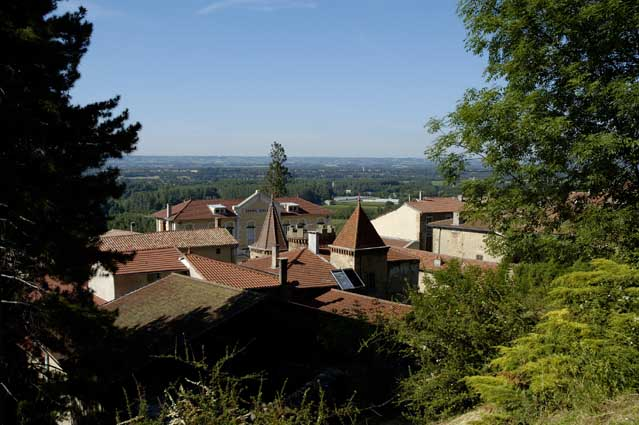 Vue de Moras